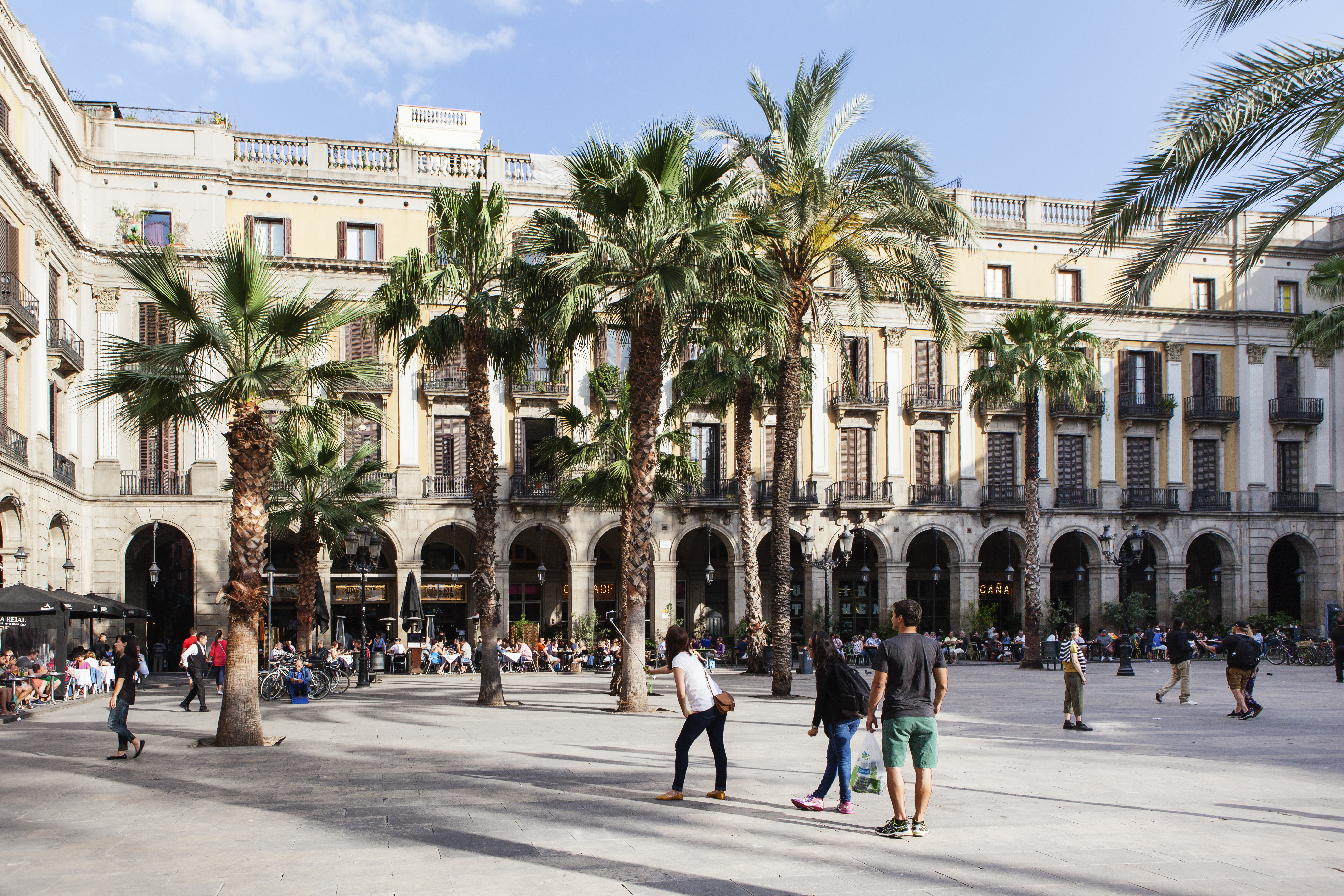 Plaça Reial in Barcelona